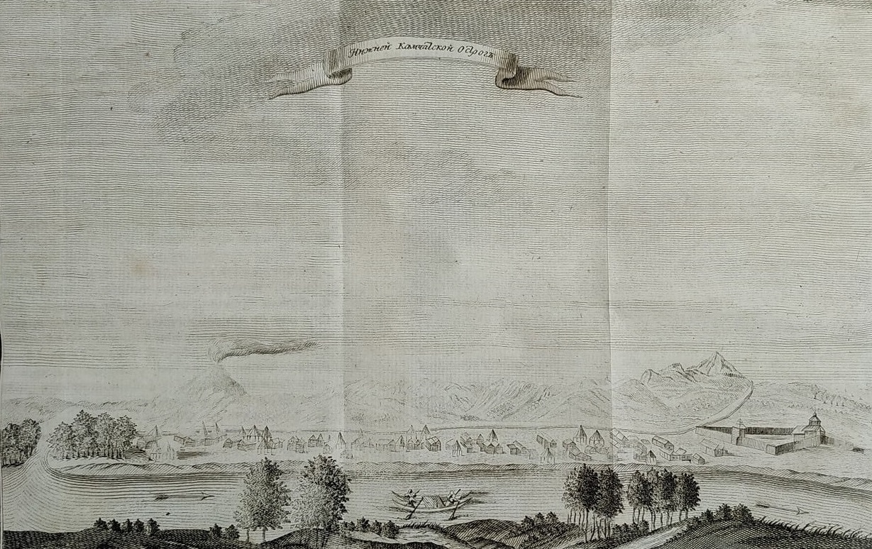 Нижнекамчатский острог. Иллюстрация к первому изданию «Описания земли Камчатки», С. П. Крашенинников — Академия наук, Петербург, 1755